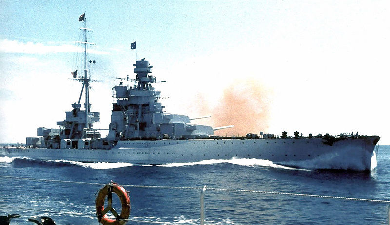 Il Regio Incrociatore ZARA alla rivista navale del maggio 1938